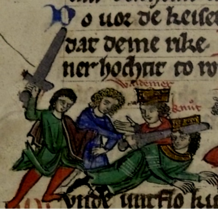 Vražda Knuta V. Dánského